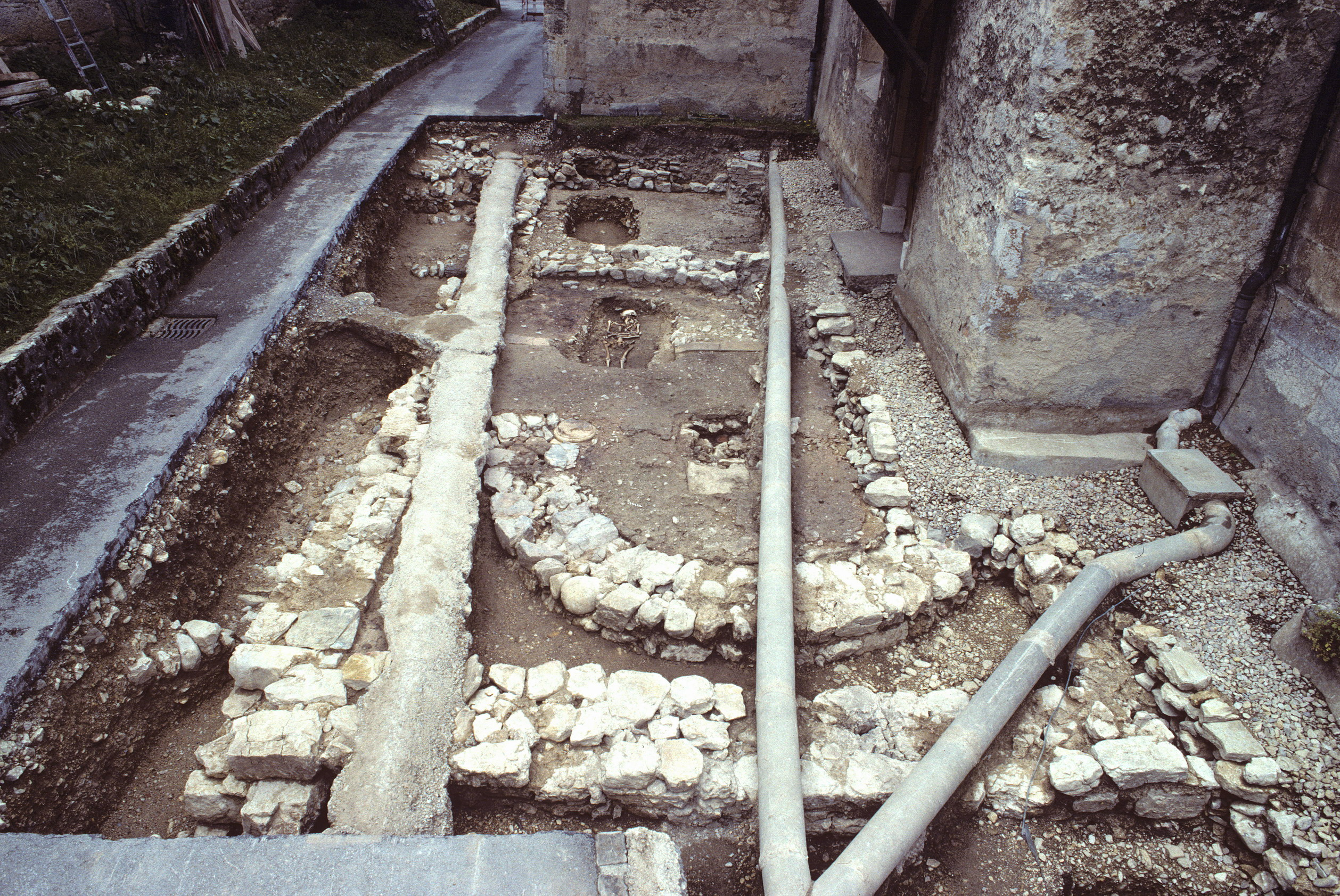 Vestige de la chapelle placée entre les églises Saint-Pierre et Notre-Dame, à Môtiers dans le Val-de-Travers